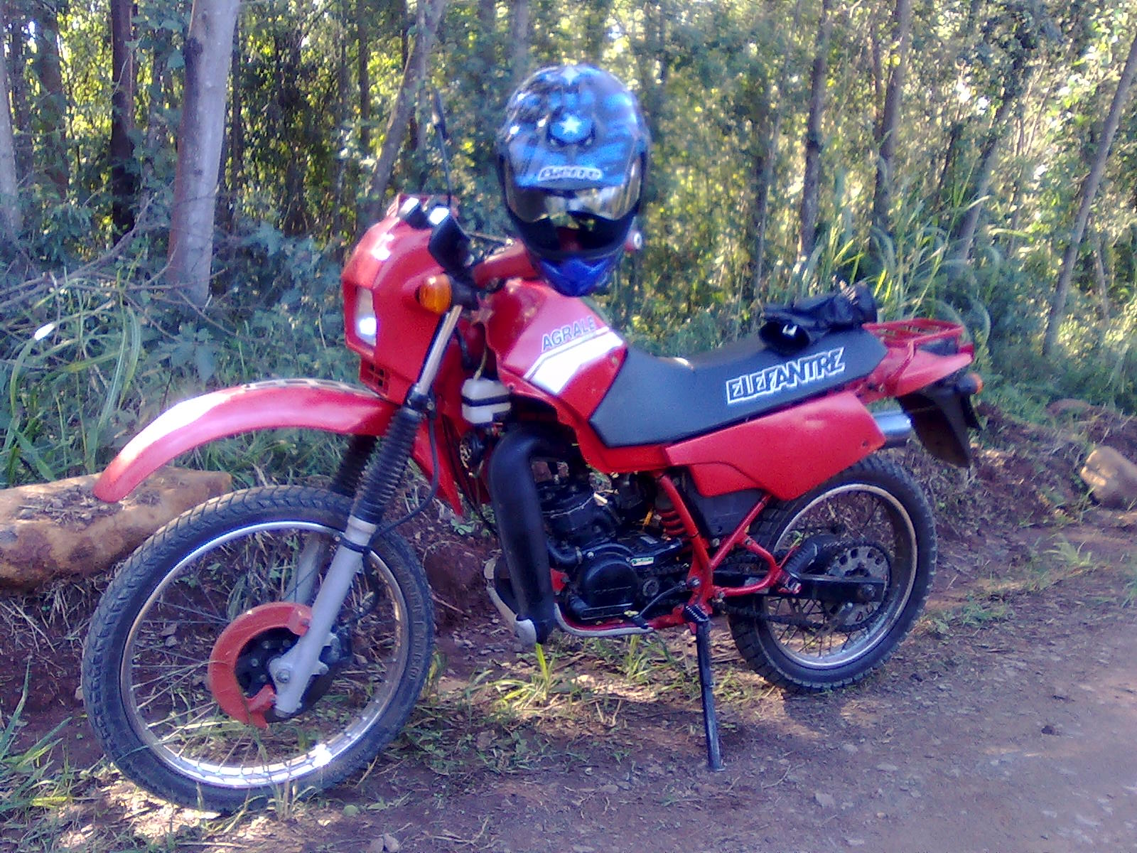 Eu, Conrado Zardo Silva, declaro que esta motocicleta é de minha propriedade.